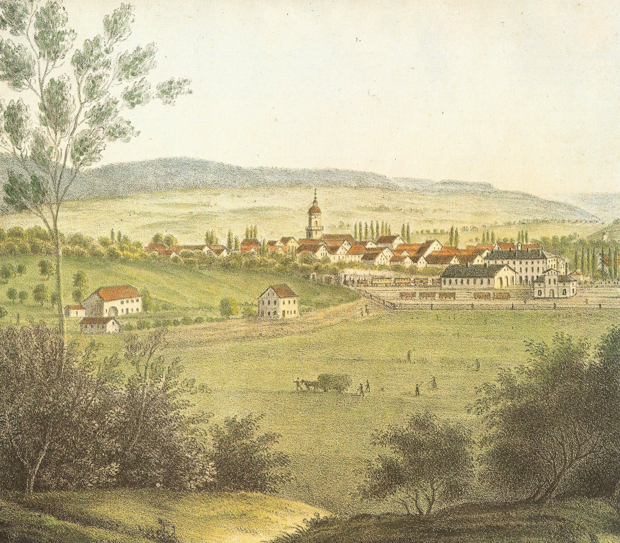 Stadt und Bahnhof Aalen vom Hirschbachtal, nach 1861